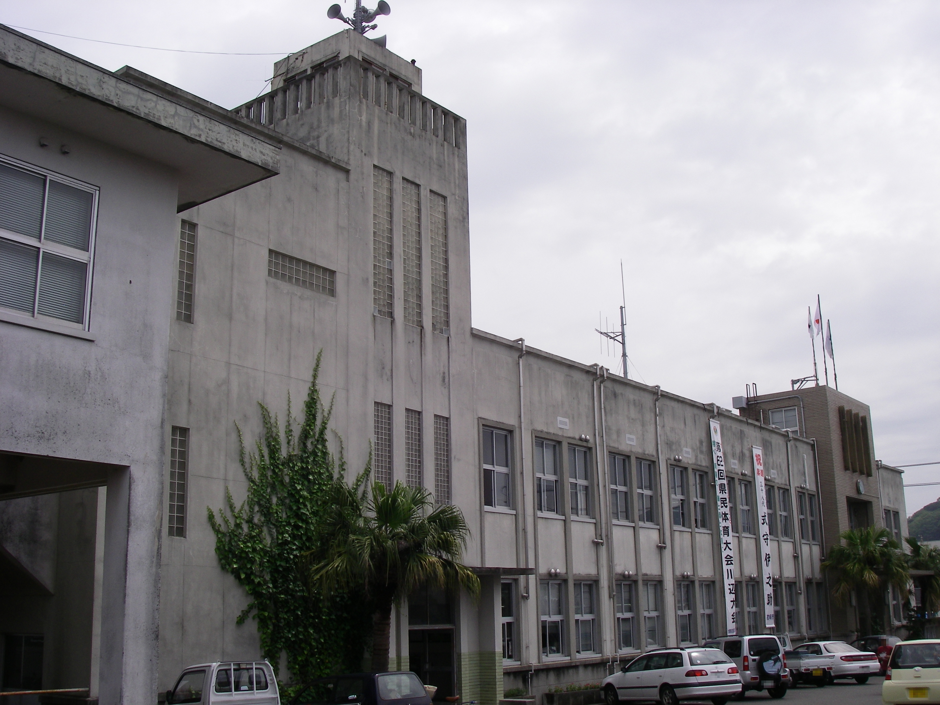 Makurazaki City Hall in Kagoshima, Japan